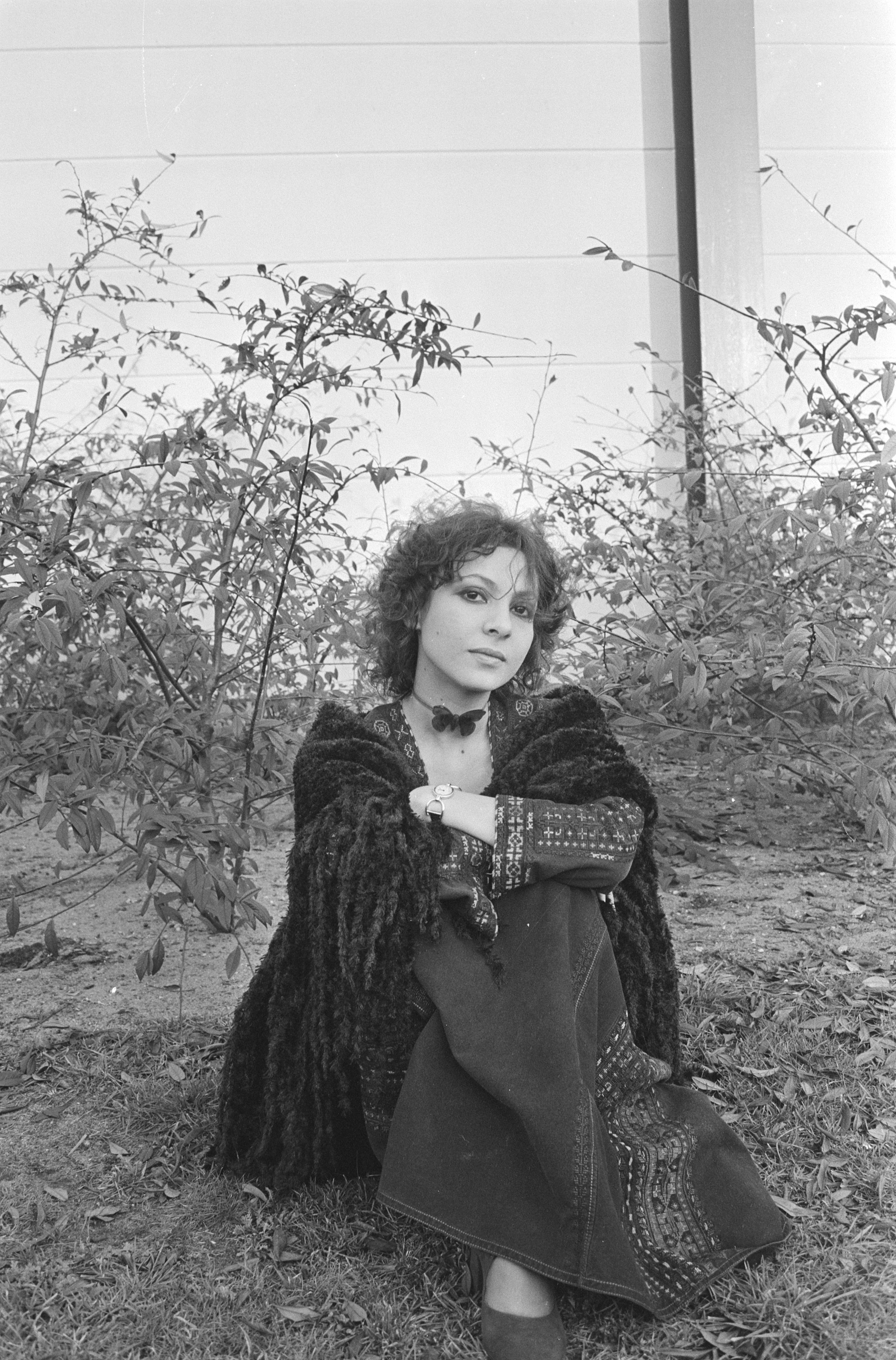 Collectie / Archief : Fotocollectie Anefo Reportage / Serie : [ onbekend ] Beschrijving : TV-opnamen Frans Halsemashow met Esther Ofarim ; Esther Ofarim in het gras, buiten Datum : 14 januari 1971 Trefwoorden : TV-opnamen Fotograaf : Peters, Hans / Anefo Auteursrechthebbende : Nationaal Archief Materiaalsoort : Negatief (zwart/wit) Nummer archiefinventaris : bekijk toegang 2.24.01.05 Bestanddeelnummer : 924-1758